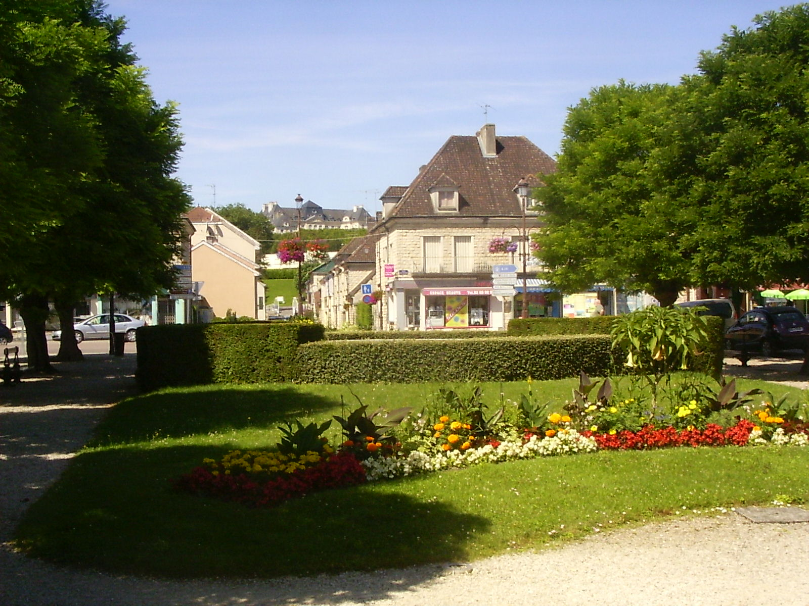 Brienne-le-Château, plantsoen